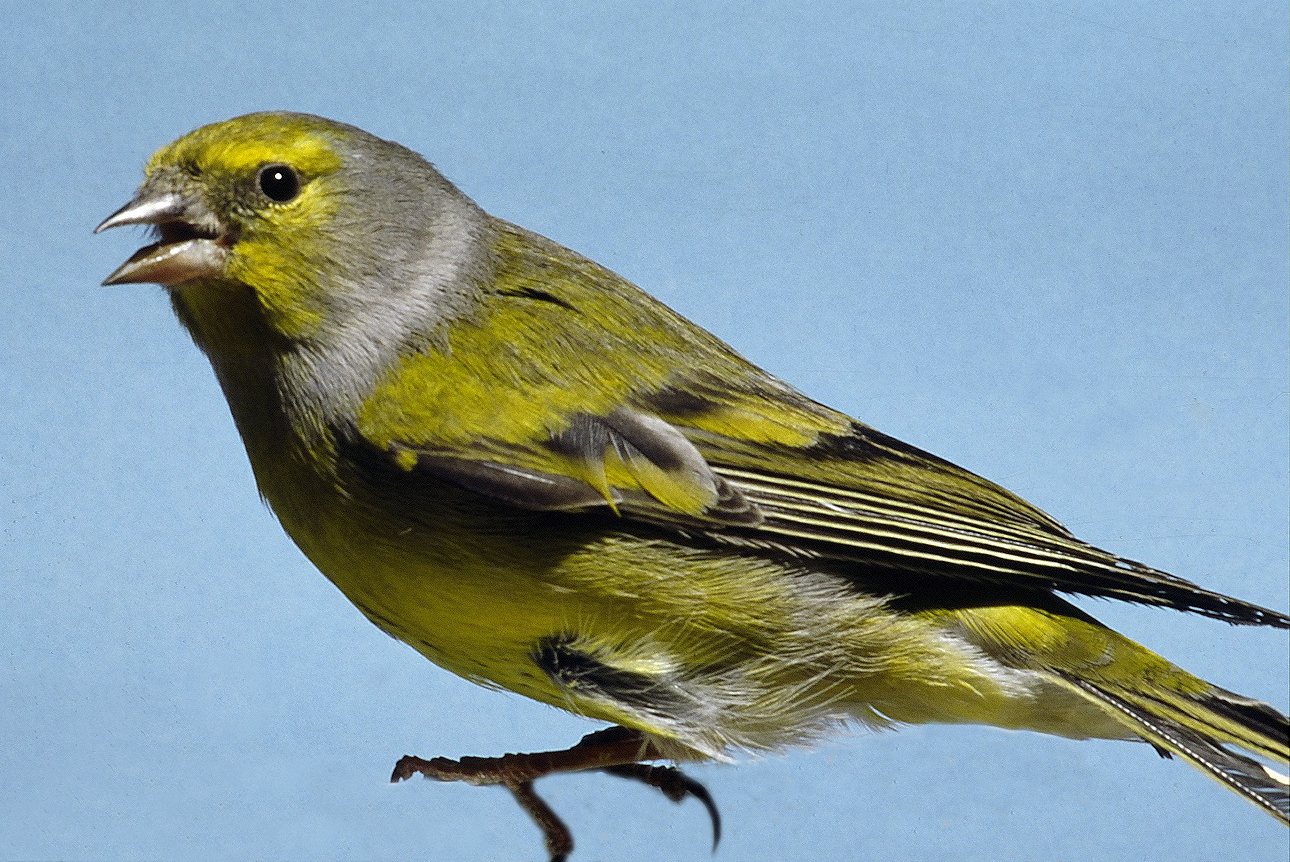 Male Citril Finch Carduelis citrinella